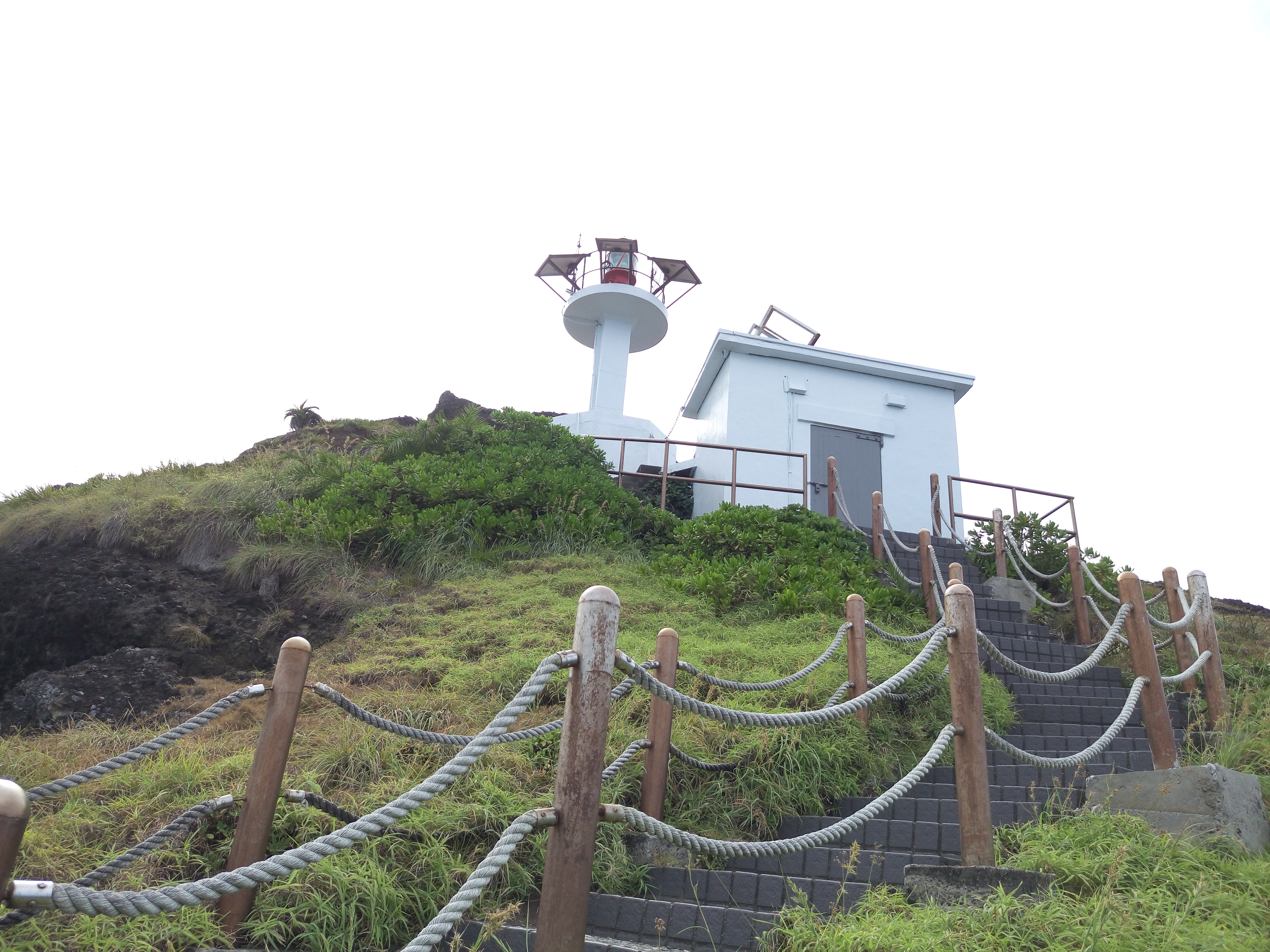 臺灣臺東成功鎮三仙台燈杆建築